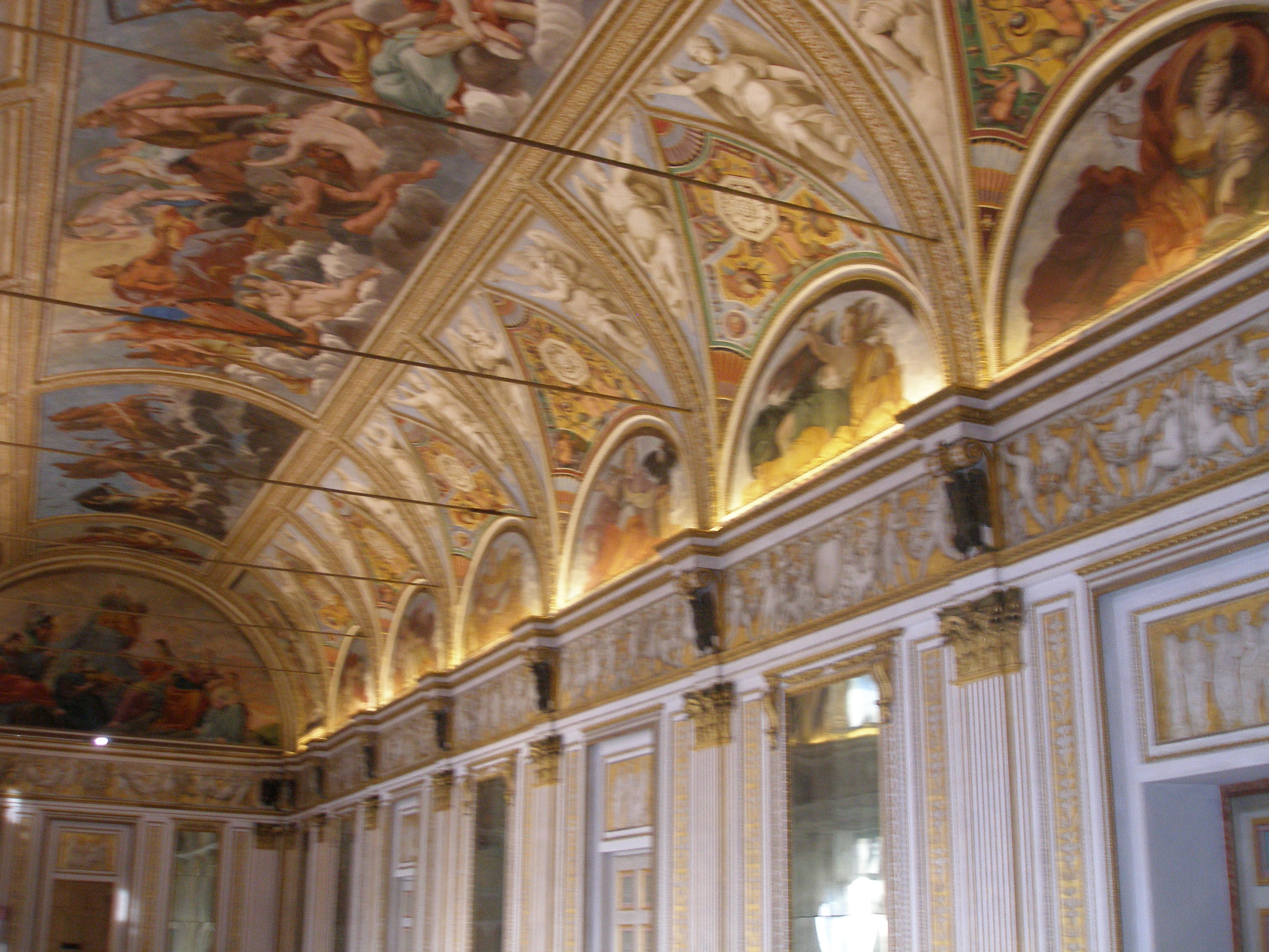 Mantua